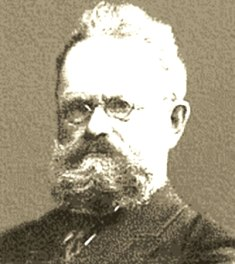 Василий Васильевич Латышев (1855—1921) — русский филолог-классик, эпиграфист и историк. Академик, Почётный член Императорского Православного Палестинского Общества.